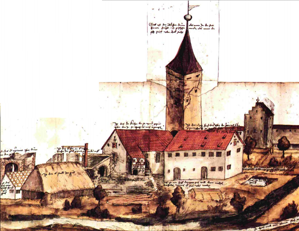 Farbige Zeichnung: Neumarkt in der Oberpfalz - Das Untere Tor - Wiederaufbau der Zerstörungen, die 1504 während der erfolglosen Belagerung der Stadt durch Nürnberger Truppen entstanden waren. Eine der ältesten bekannten Abbildungen der Stadt. Staatsarchiv Amberg.